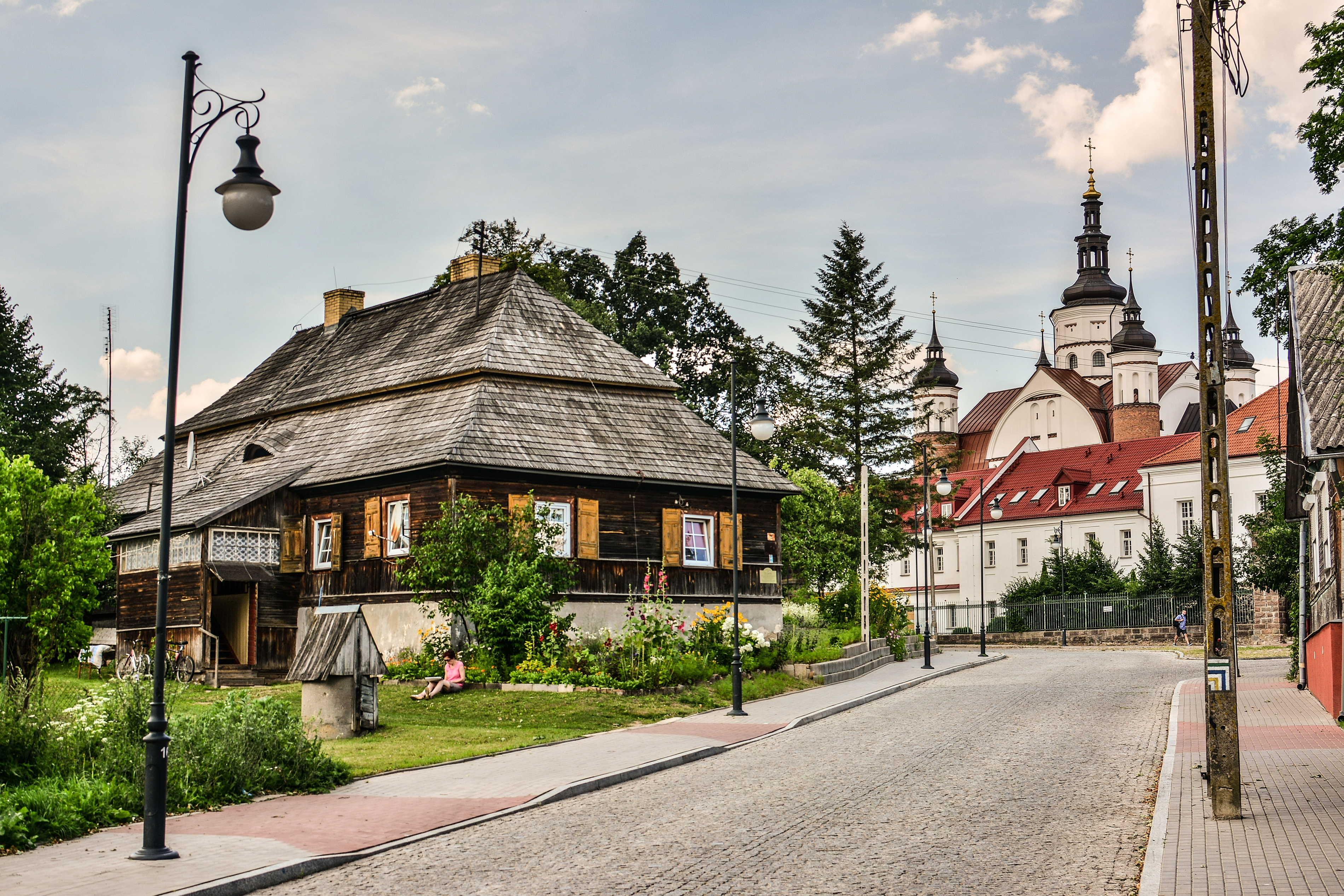 Supraśl, karczma (dec. dom), XVIII/XIX